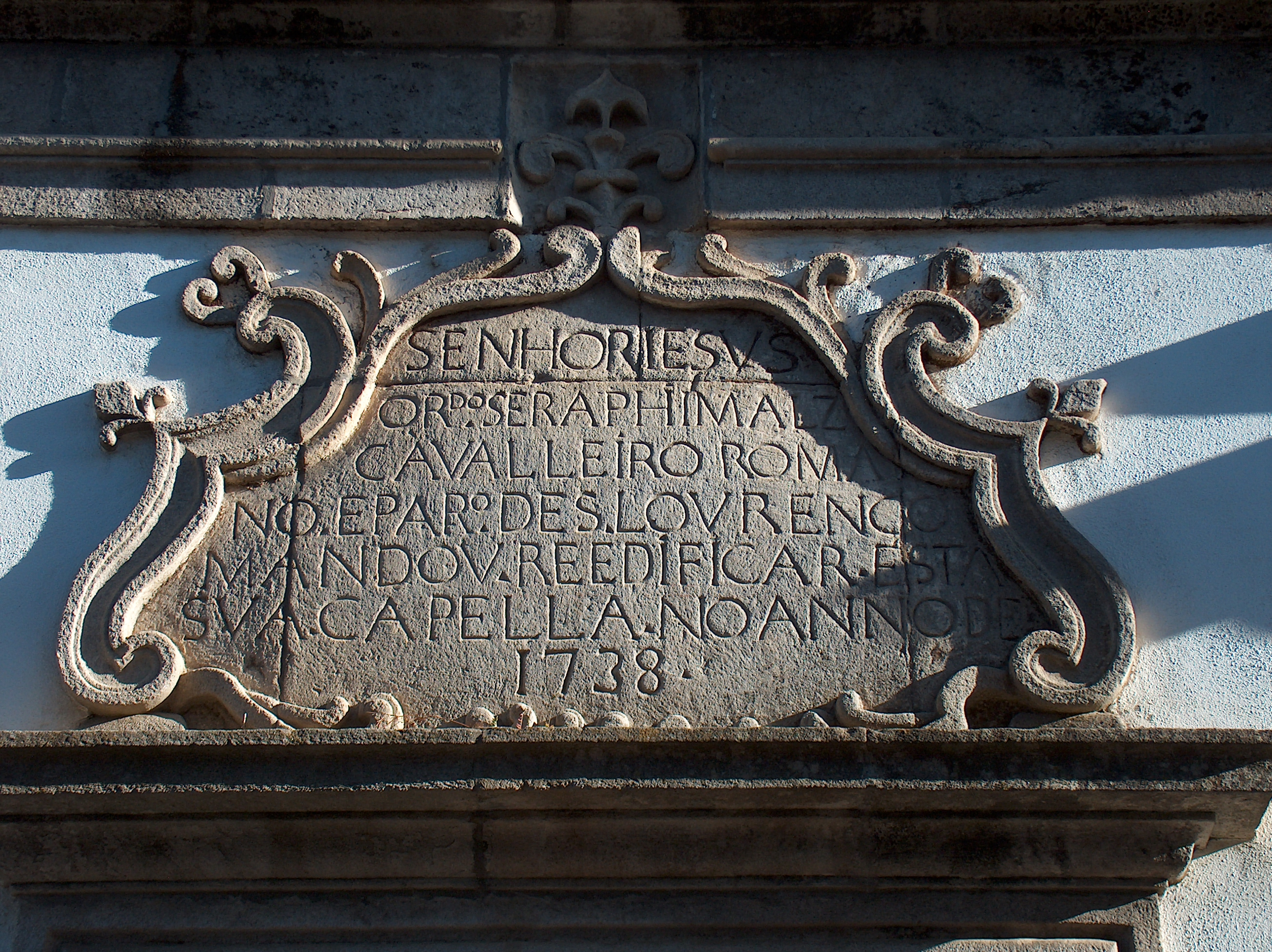 Igreja de Constantim (incluindo as capelas anexas e o altar-mor de talha com sacrário giratório)